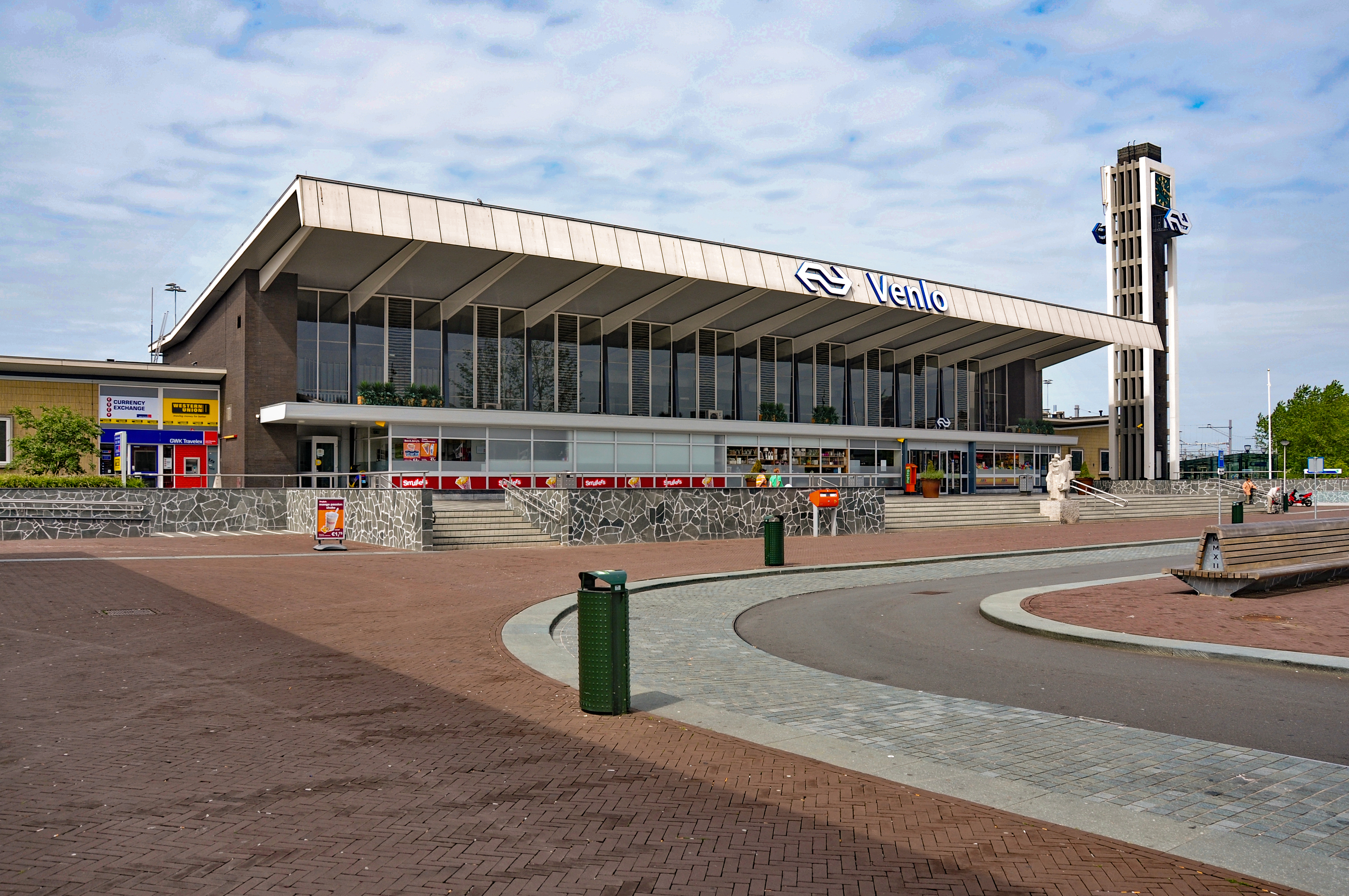 Venlo, Niederlande, 2013